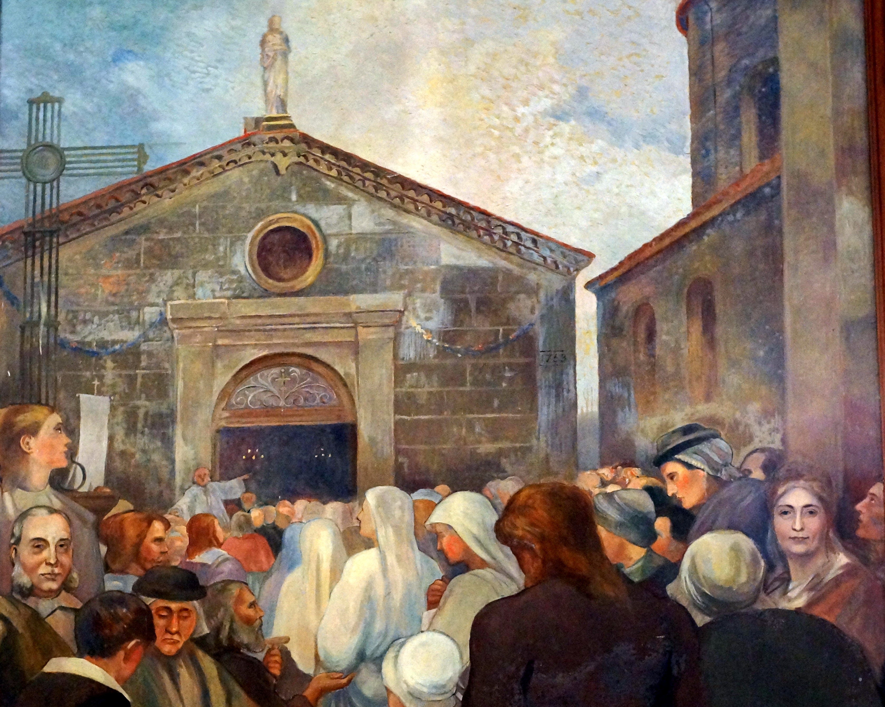 Tableau présentant le Pèlerinage annuel de Notre-Dame de Pitié